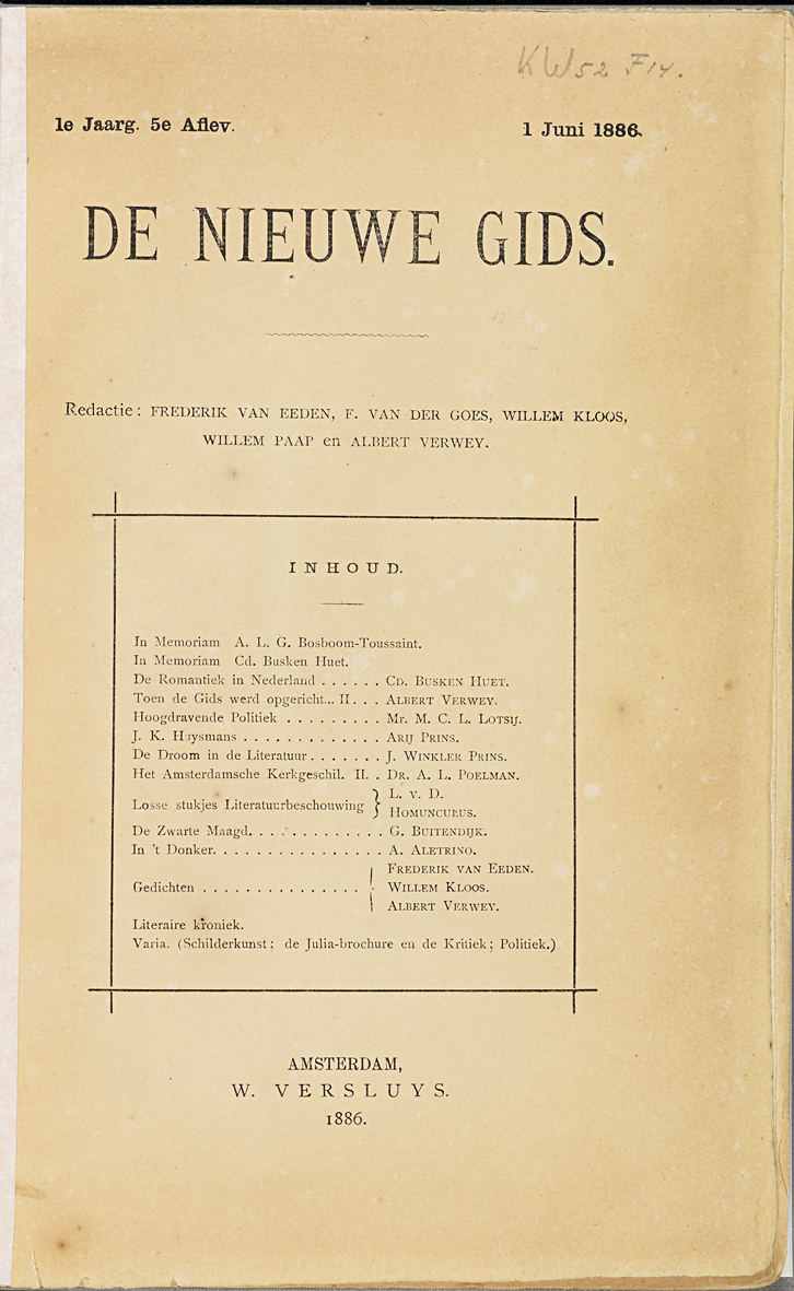 Titelpagina van de vijfde aflevering van de eerste jaargang van het tijdschrift "De Nieuwe Gids" (1 juni 1886)